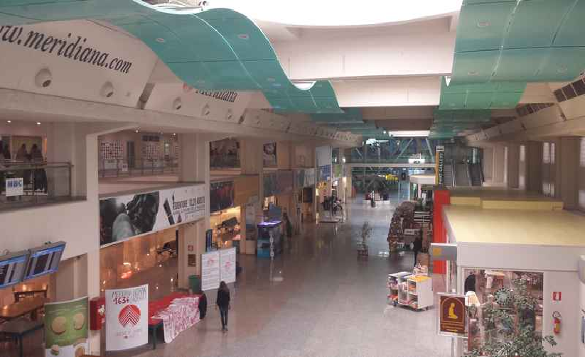 Zona commerciale tra l'aera arrivi e quella partenze